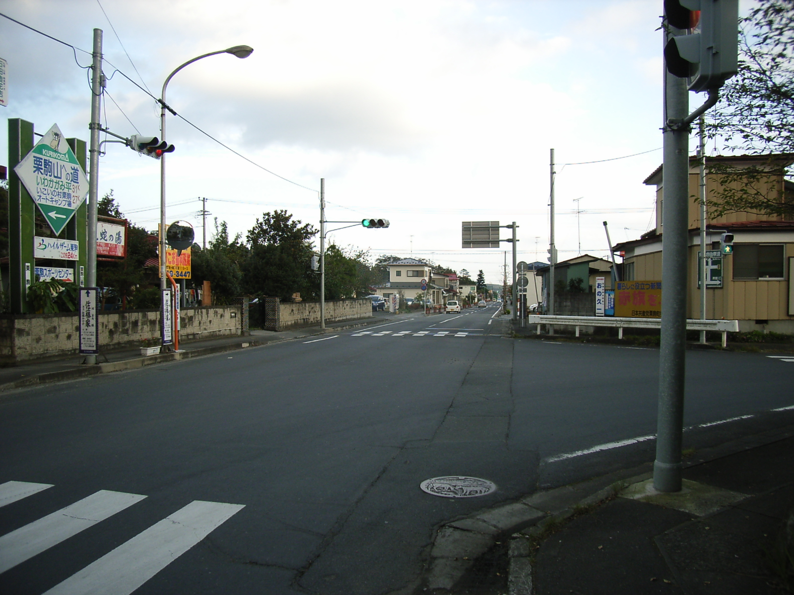 Miyagi prefectural Road 4. Nakada-Kurikoma Line. Kurihara, Miyagi prefecture, Japan.